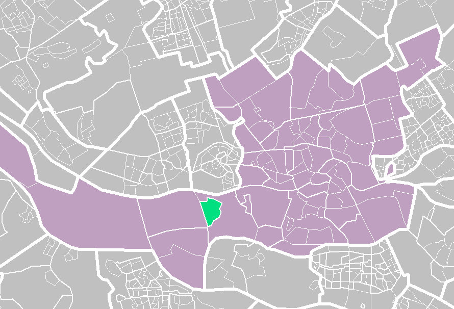 Rotterdam districts/neighboorhoods